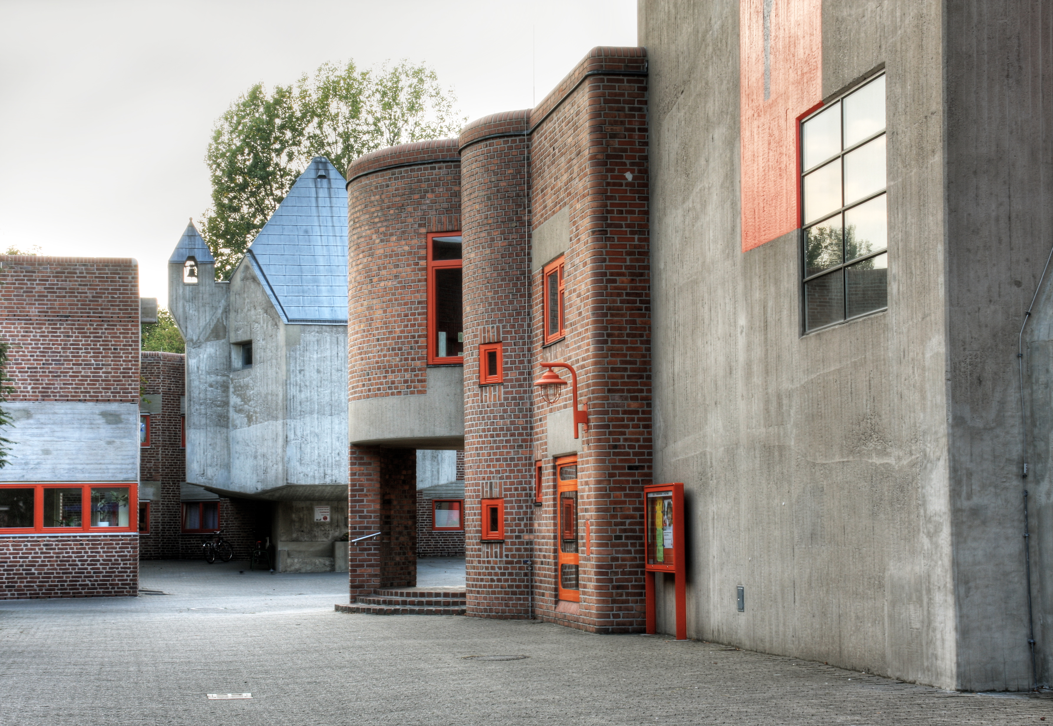 Altenwohnheim St. Hildegardis und Kirche St. Matthäus in Düsseldorf-Garath, Architekt: Gottfried BÖhm